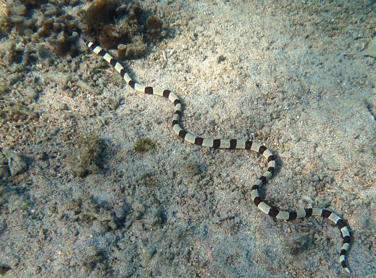 Une Anguille-serpent à bandes (Myrichthys colubrinus) à la Réunion. (photo E. Morcel)